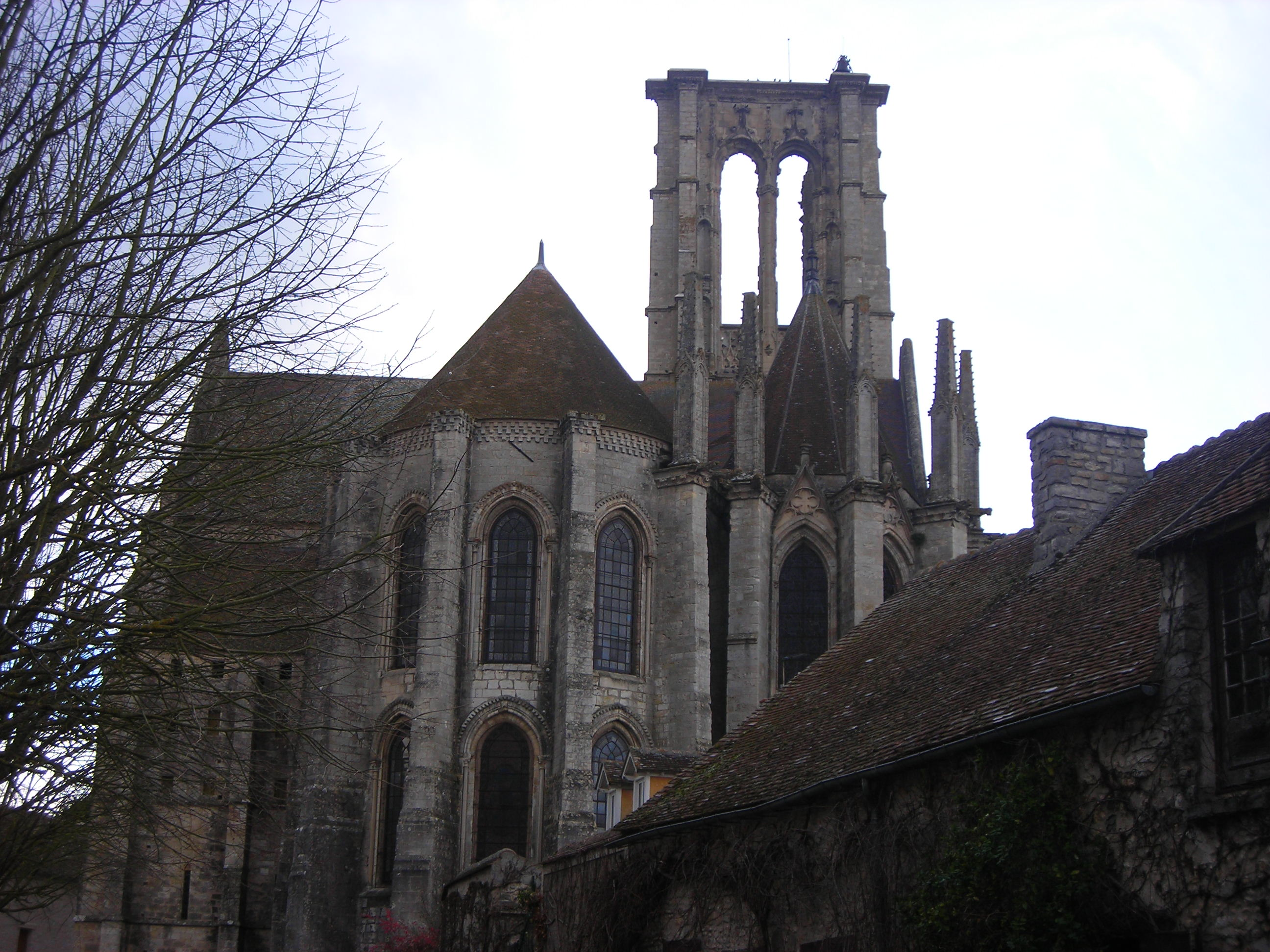 Vue de l'église Saint-Mathurin de Larchant